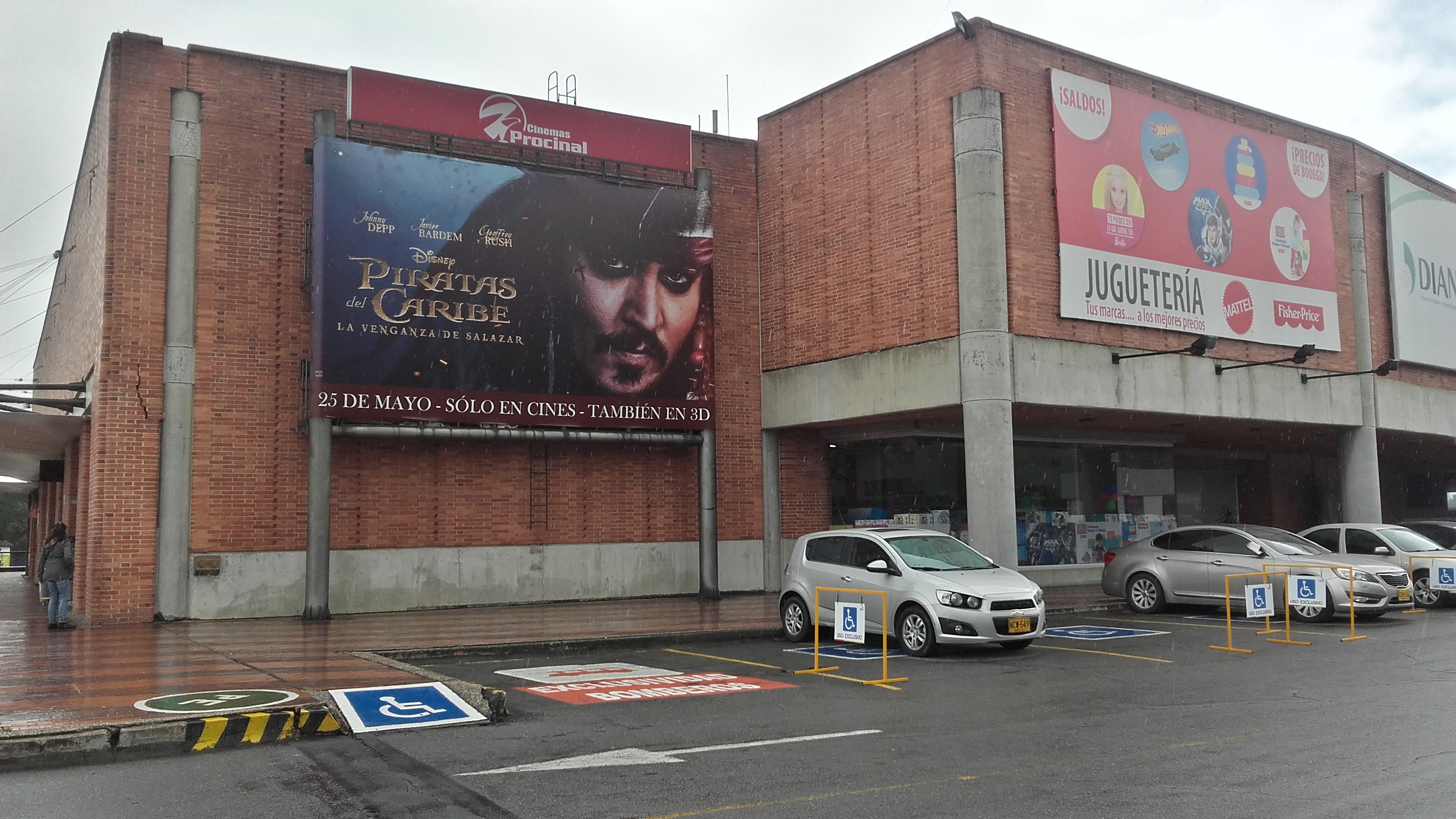 fmflcllclvl